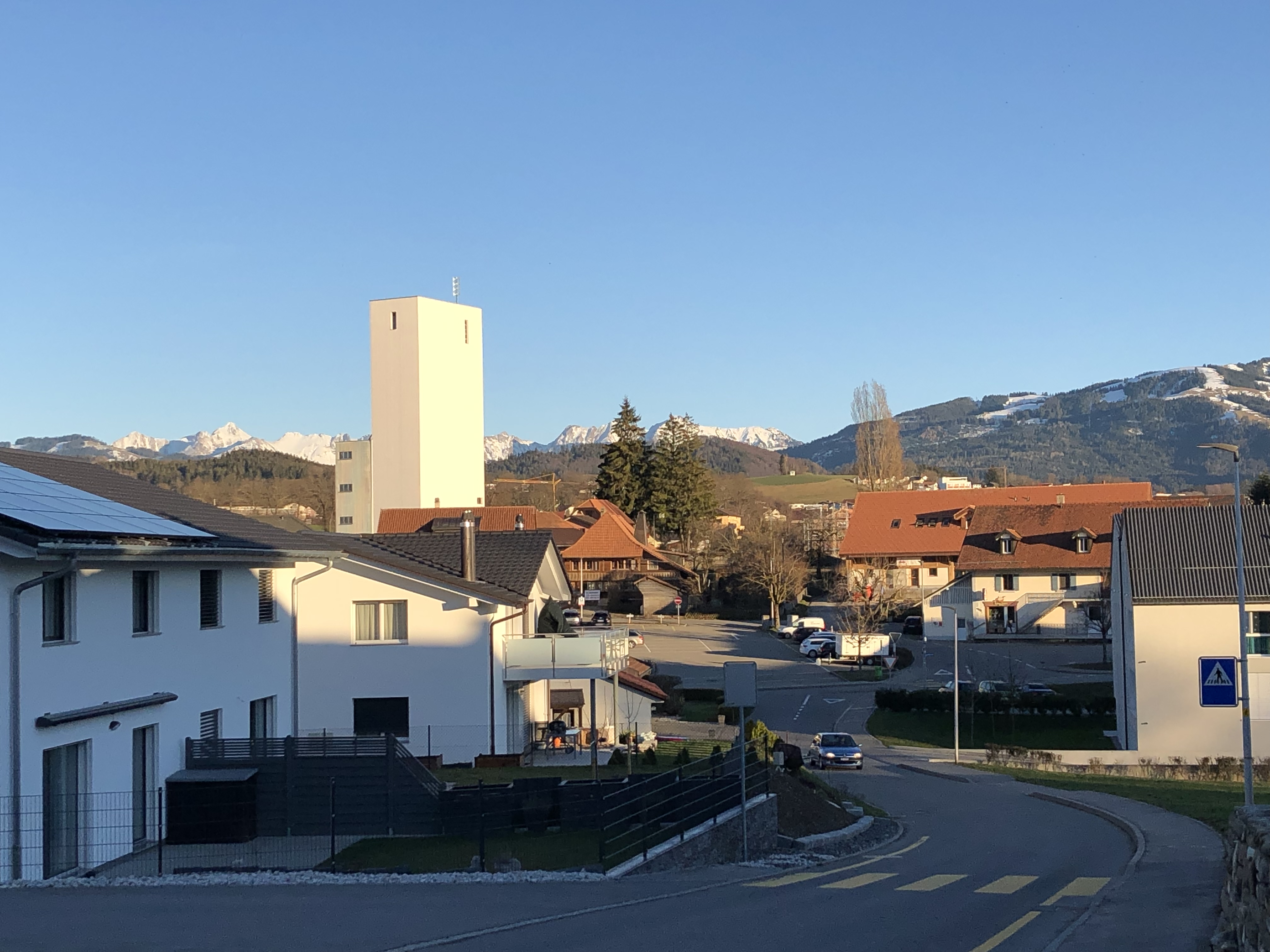 Auf dem Bild ist ein Teil der schweizerischen Gemeinde Tentlingen zu sehen, die im Sensebezirk liegt. Die Aufnahme zeigt einen Teil des Dorfzentrums.